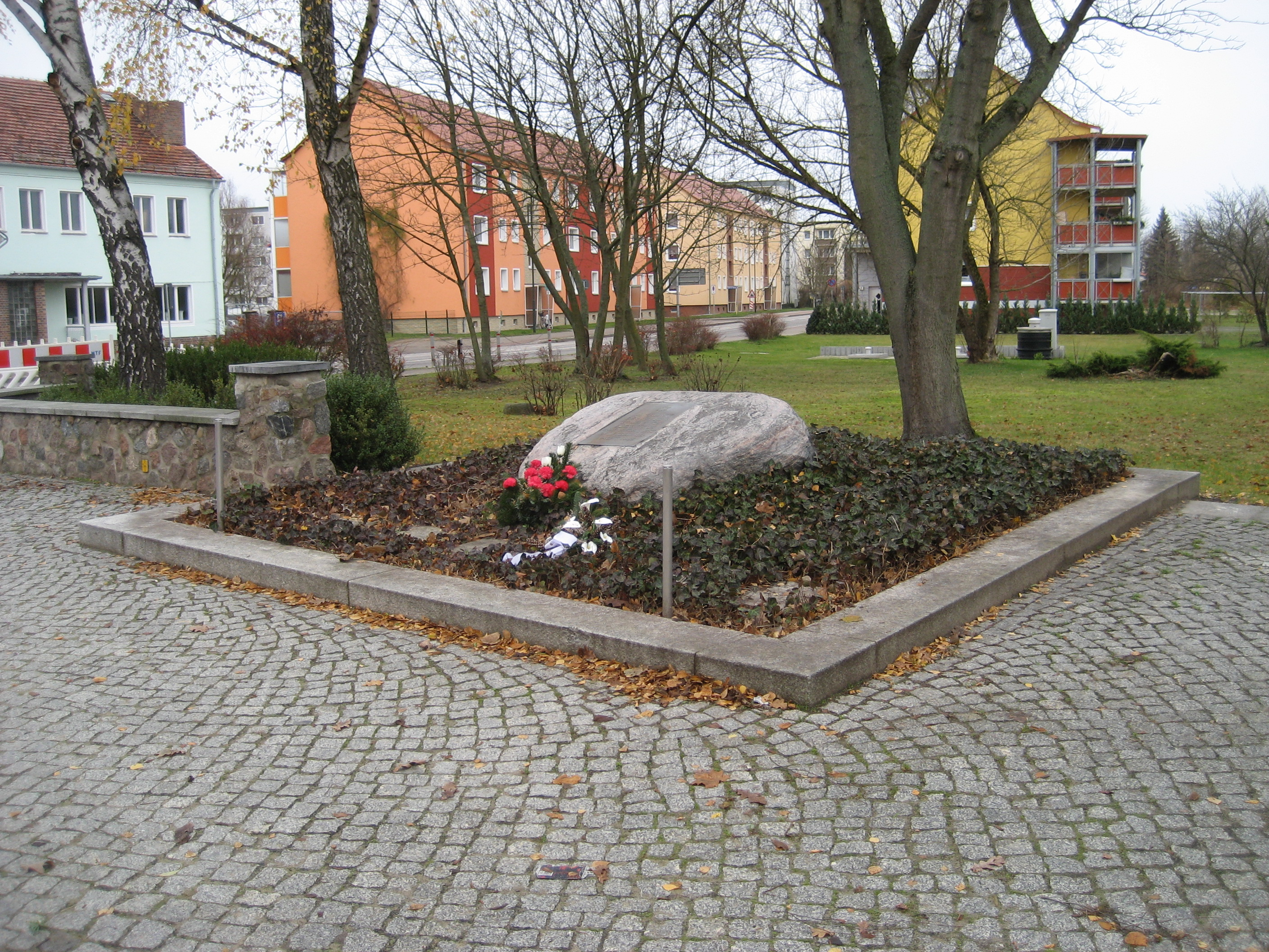 Neu gestalteter Platz aus dem Jahr 2004, mit dem neuen Gedenkstein für die jüdische Gemeinde von Löcknitz und deren Verfolgung, Vertreibung und Ermordung während der Shoa, an der Chausseestraße/Ecke Straße der Republik, aus Blickrichtung Südosten.